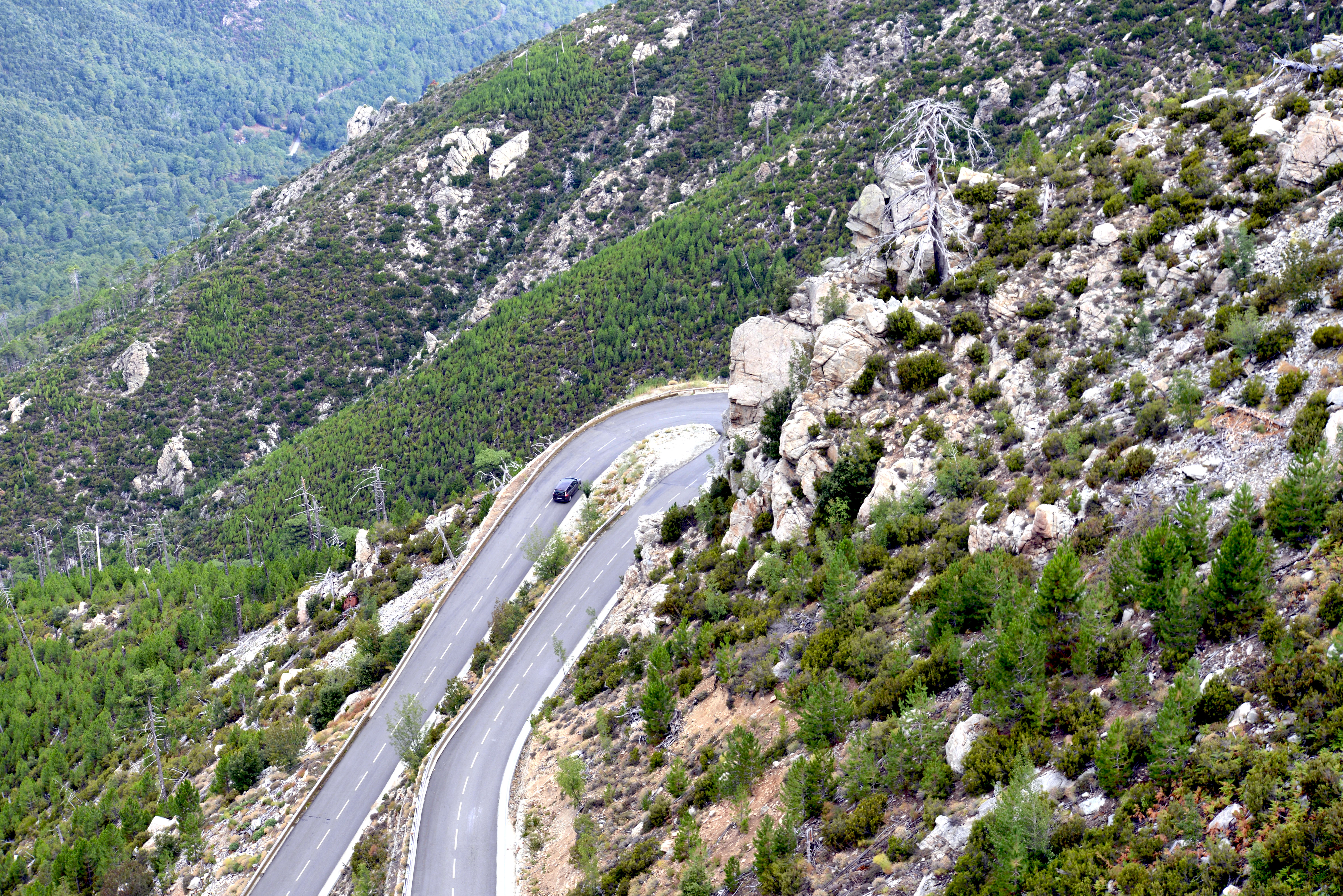 Muracciole, Centre Corse - Lacet de la route D69 pour accéder au col de Sorba